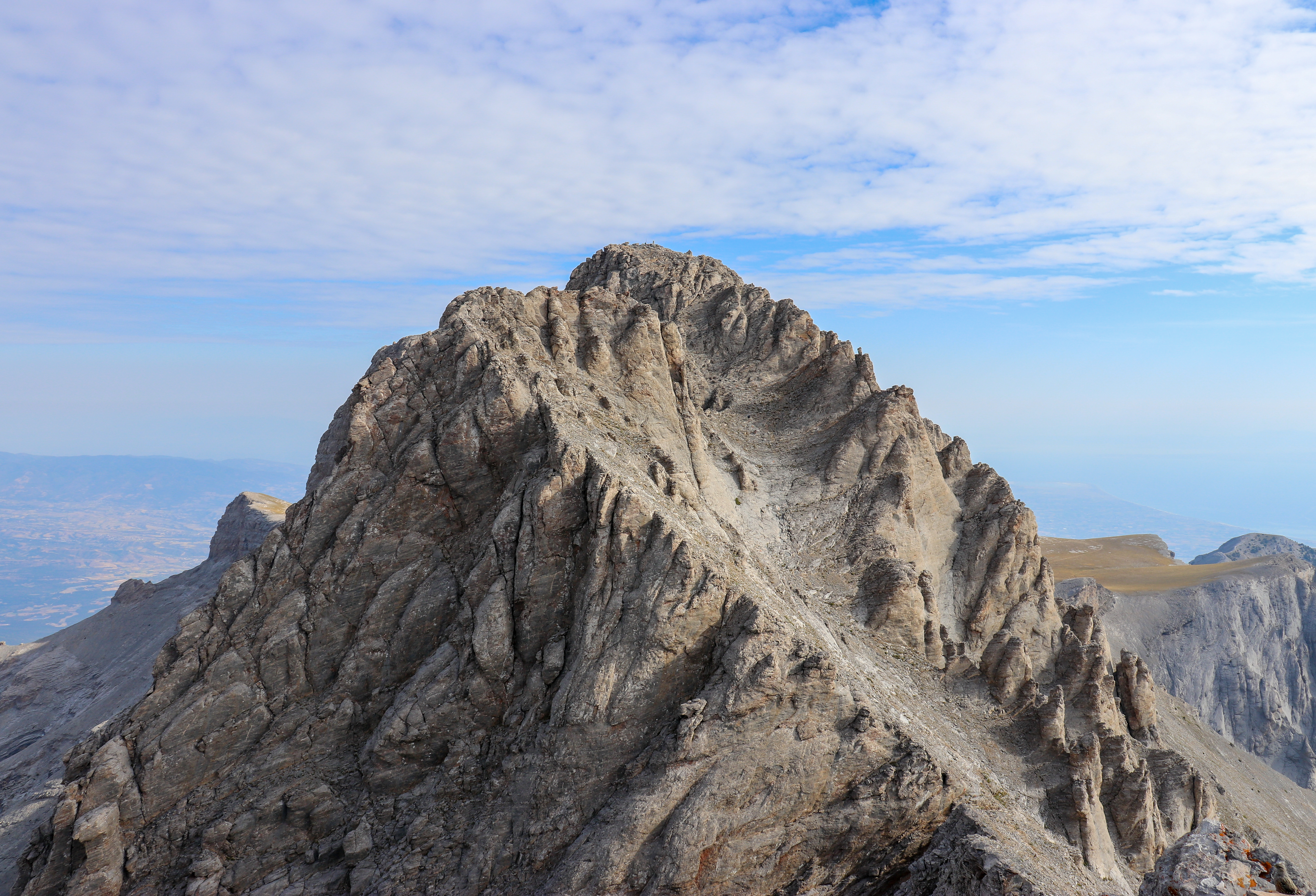 Самая высокая вершина Олимпа Митикас (2917 м). Вид с вершины Скала.